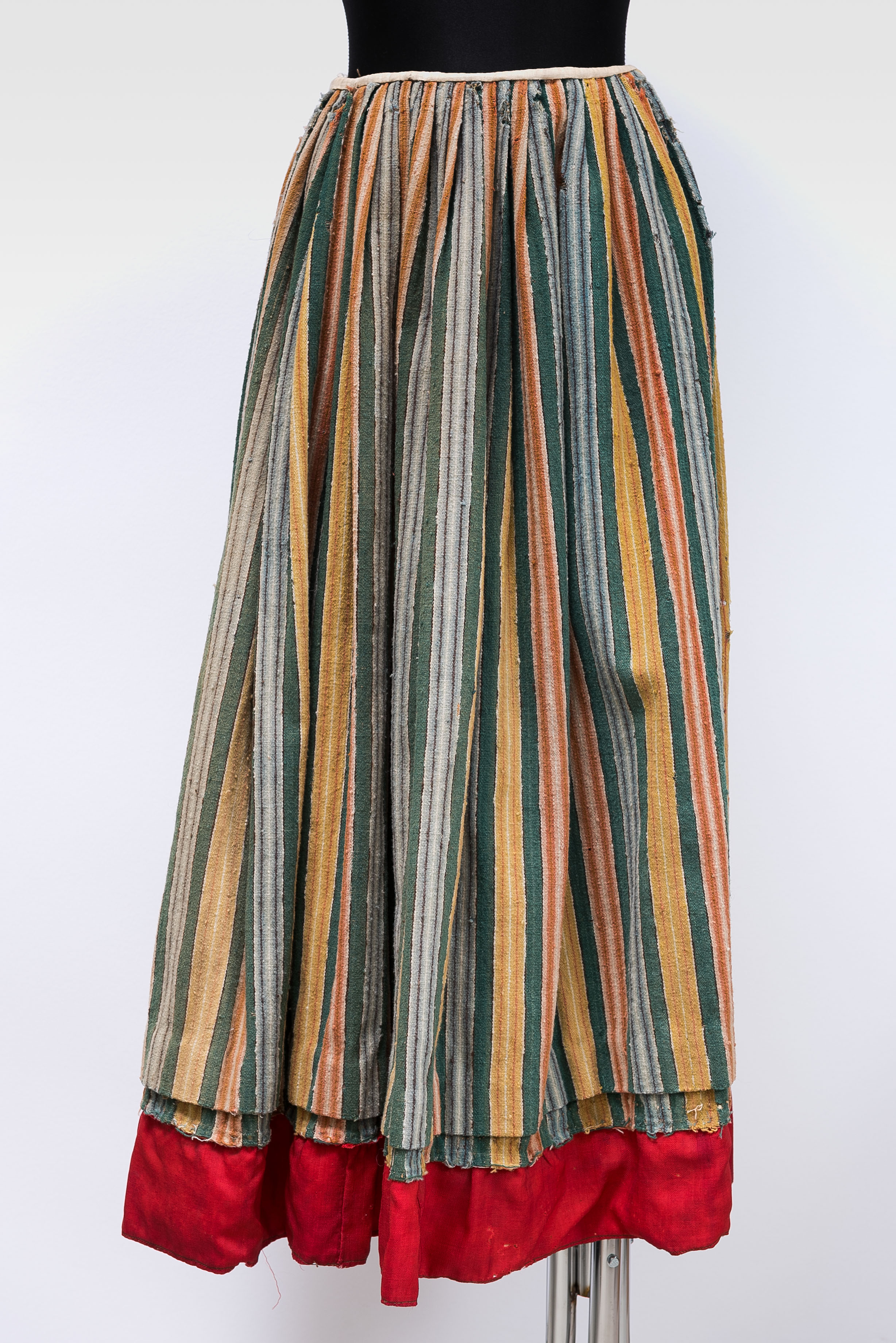 Seelik Kadrina kihelkond Villane, pikitriibuline. Rohelisel põhjal kolm rühma täislaugulisi triipe: 1) valge (süda), sinepikollane, pruun, kollane, valge, lambapruun 2) valge (süda), heleroosa, tumeroosa, pruun, tumeroosa, heleroosa, valge, lambapruun 3) valge (süda), helesinine, tumedam sinine ja õige tumesinine -- samad värvid korduvad vastupidises järjekorras, ääres lambapruun joon. Seeliku allosas on põikivolt, selle all 3 cm laiune hõbekardpael ja 10,5 cm laiune punane poevillasest riidest toot. Toot on pahemalt poolt vooderdatud peene linasega. Värvli kohal on seelik tihedais voltides. Värvliks kitsas linane kant, mille ühes otsas silmus, teises kaheharuline nöör. Seelik on küljelt avatud. Küljeava on vooderdatud ruudulise poeriidega. 1801 - 1860 olme/eluolu Provintsiaalmuuseumi saadud Kadrina kihelkonnast Virumaal.; Eesti Kadrina Kadrina